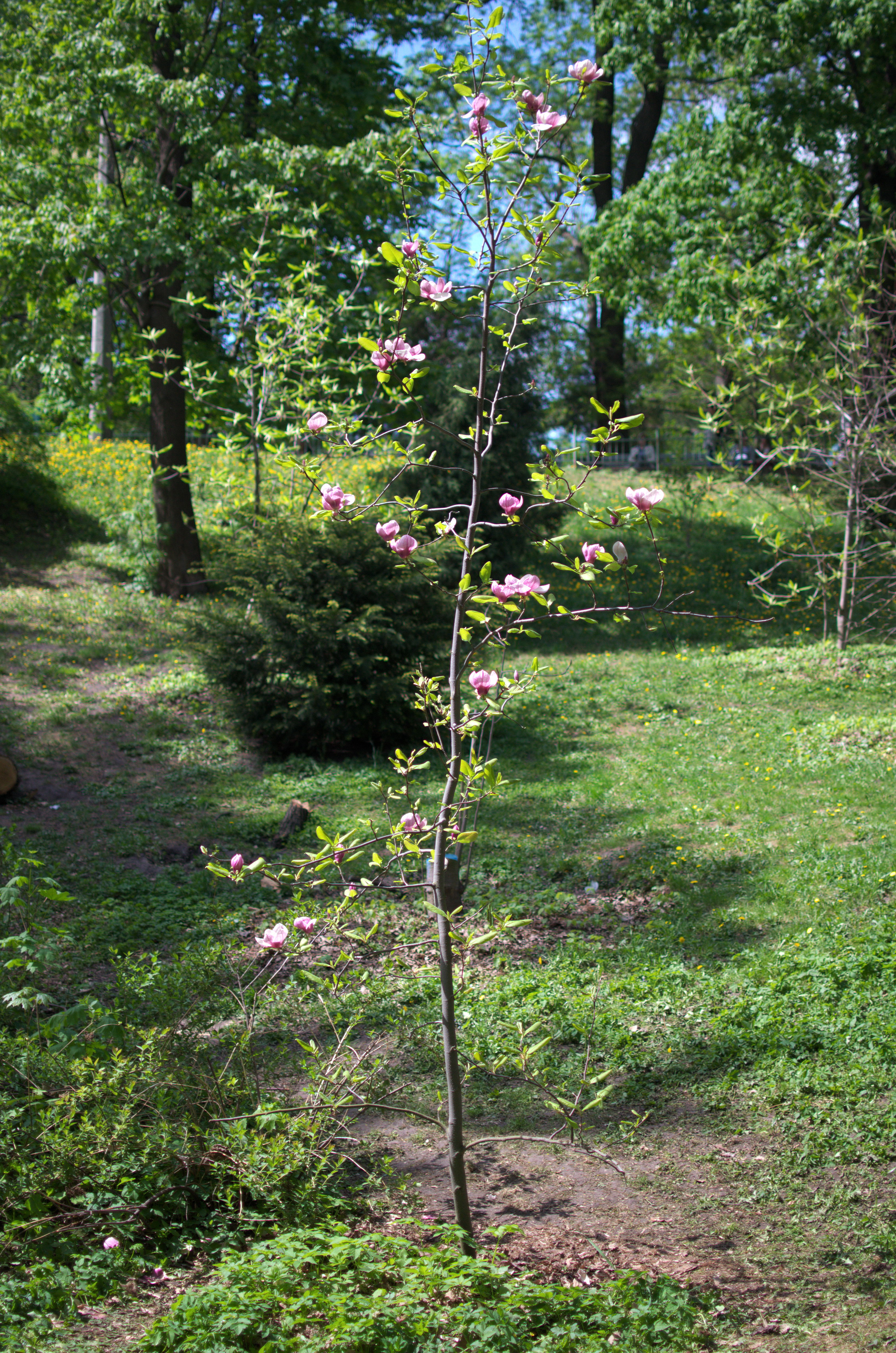 Ботанічний сад ім. І.Фоміна